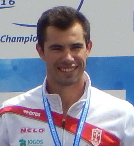 Церемония награждения соревнований в байдарке-одиночке у женщин на 1000 м